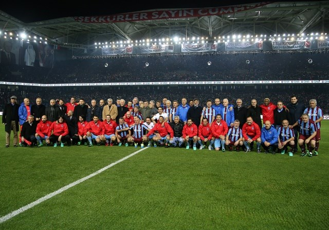 Açılış Maçı Trabzonspor Efsaneleri